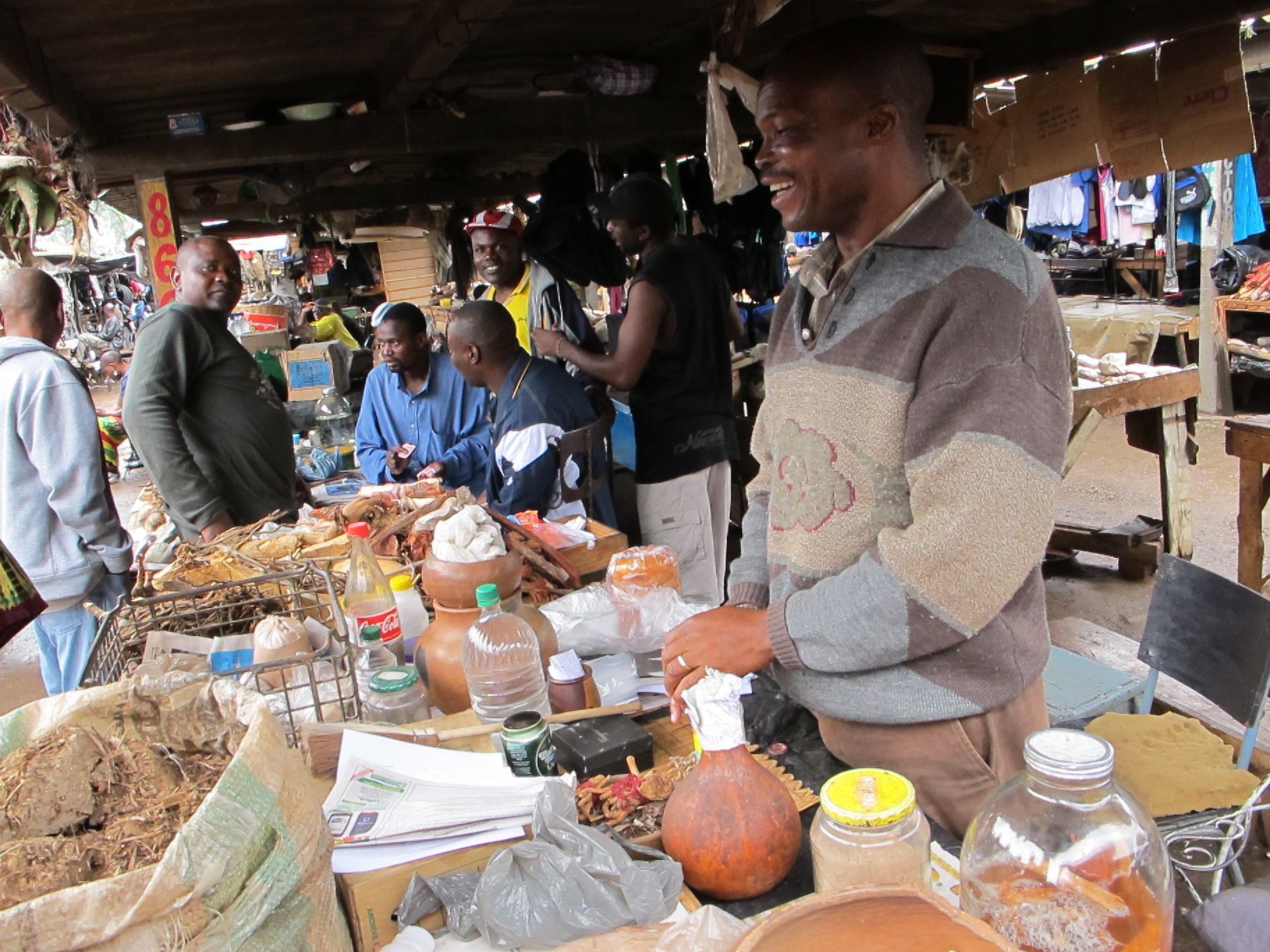 Mbare market, 31 January 2010, Harare